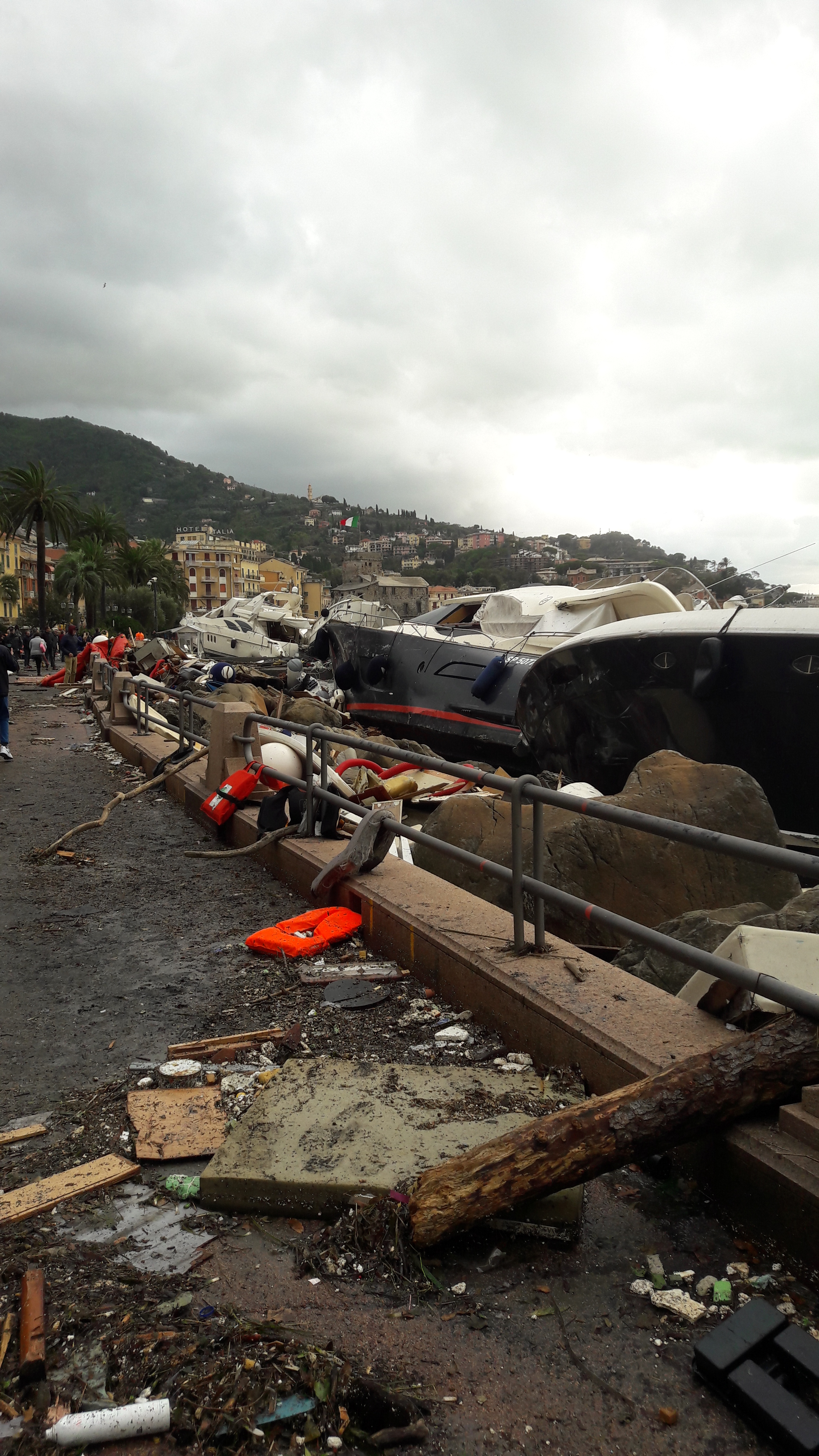 Particolare dei danni provocati dalla mareggiata del 29 e 30 ottobre 2018 a Rapallo, Liguria, Italia